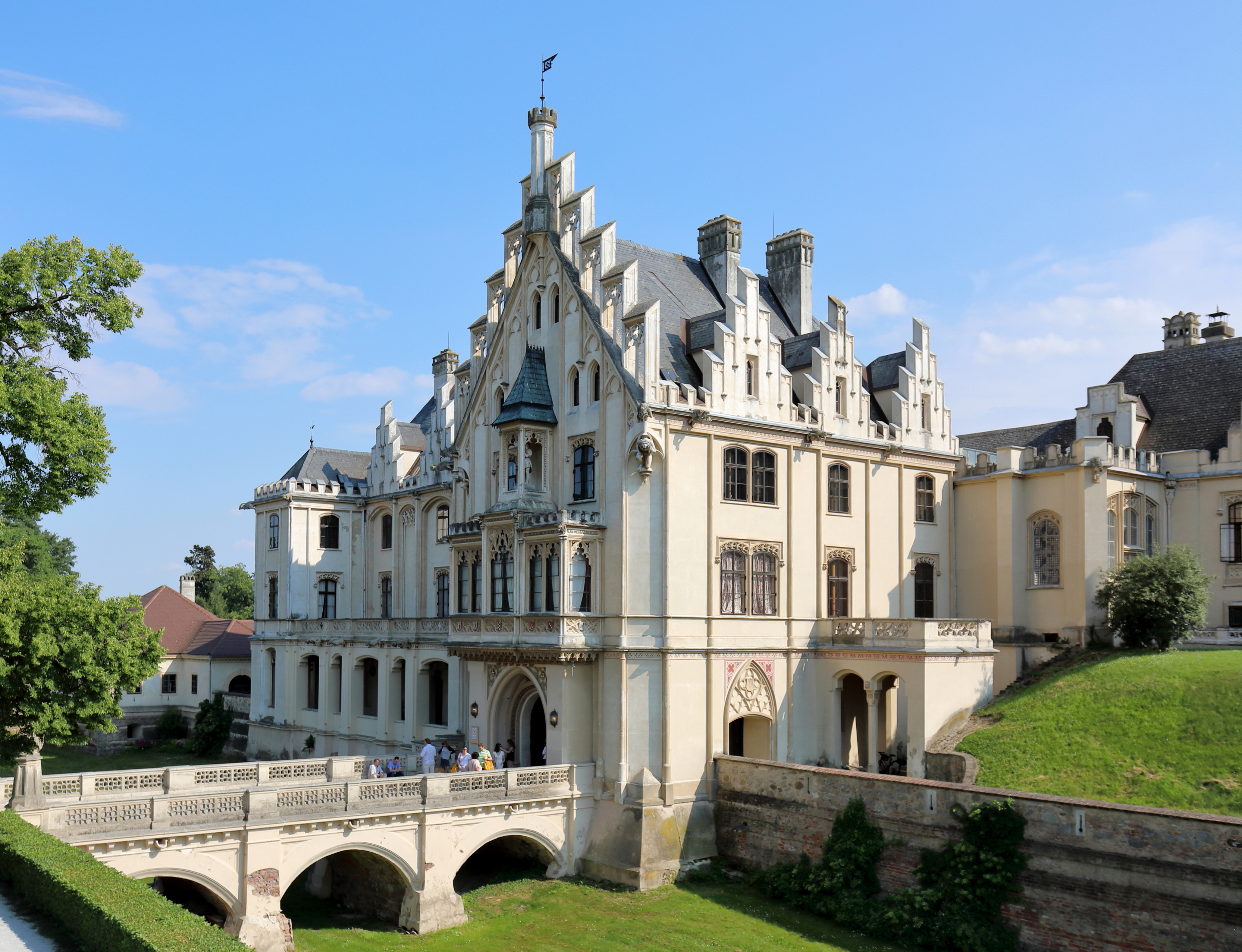 Der 1857 errichtete Torbau mit Brücke an der Mittelachse des Nordtraktes des Schlosses Grafenegg in der niederösterreichischen Marktgemeinde Grafenegg. Urkundlich 1294 als Festes Haus mit Mauer und Graben aufscheinend, wurde die Anlage 1645 im Zuge des Dreißigjährigen Krieges durch die Schweden gestürmt. Anschließend erfolgte die Wiederinstandsetzung und der Ausbau zu einer Vierflügelanlage. Von 1845 bis 1872 fand ein weiterer Aus- und Umbau zu einer romantisch-historistischen Schlossanlage statt und das Schloss erhielt dabei im Wesentlichen sein heutiges Erscheinungsbild. Die schweren Schäden infolge von Kriegs- und Nachkriegsereignissen wurden durch eine Restauration und Wiederinstandsetzung ab 1967 behoben.